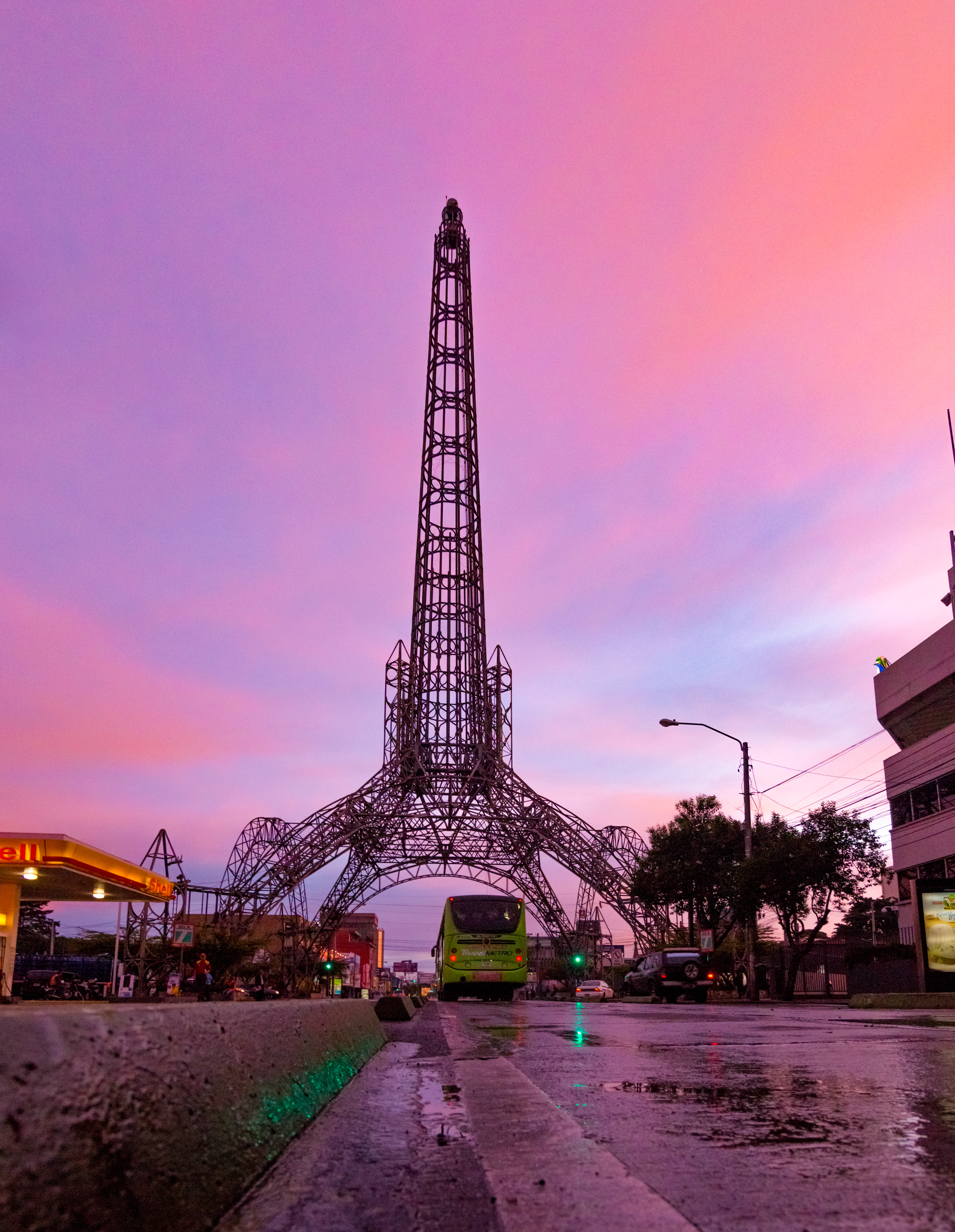 Torre del Reformador de Guatemala por Fabriccio Díaz